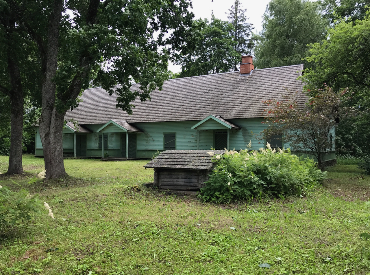 Tõdva vennastekoguduse palvemaja